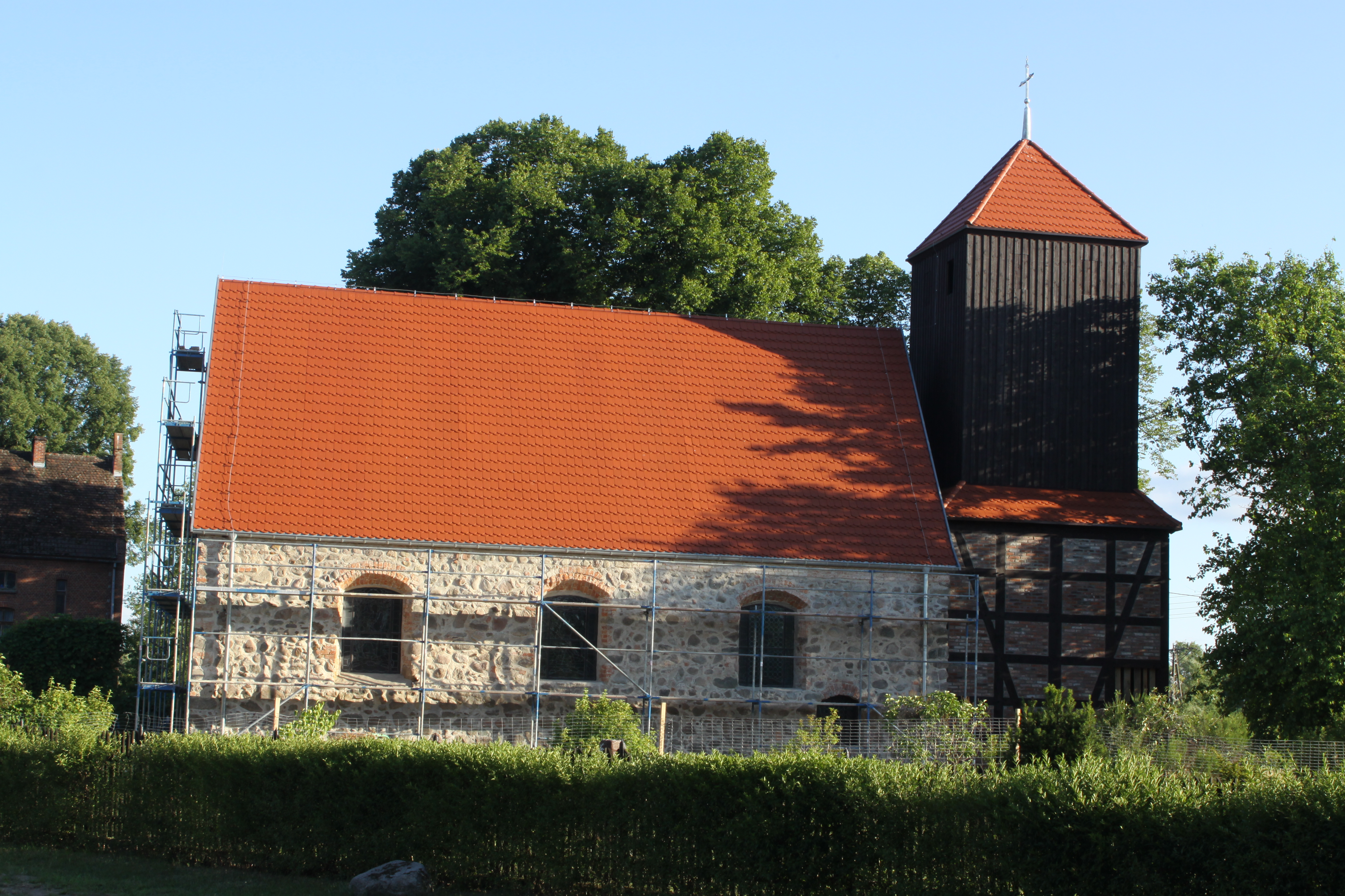 Dominikowo - dawny kościół ewangelicki, obecnie rzymskokatolicki filialny p.w. Wniebowzięcia NMP, ok. 1600